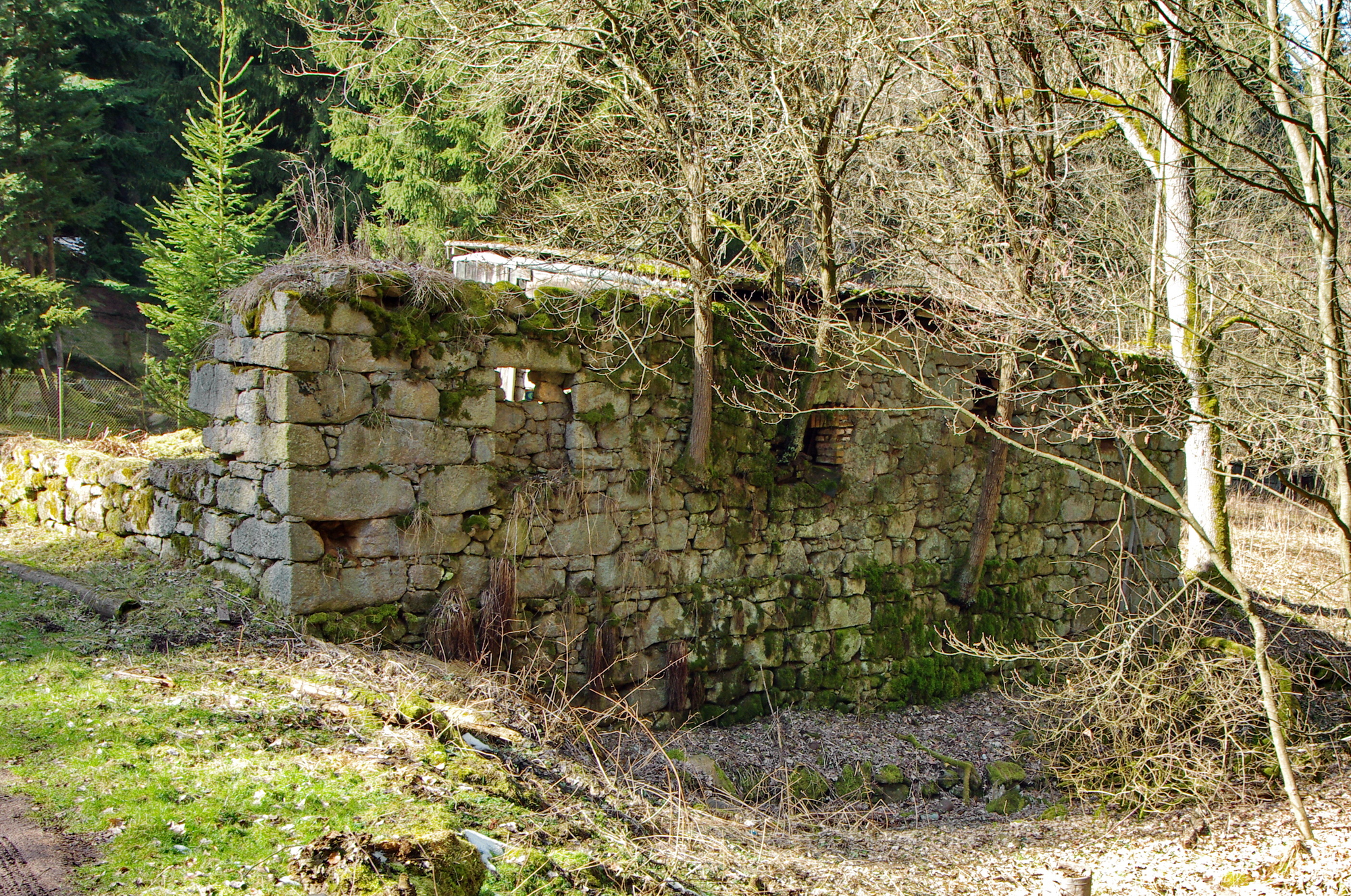 Lobezský mlýn, pozůstatek hospodářské budovy, Lobezský potok, Slavkovský les, okres Sokolov